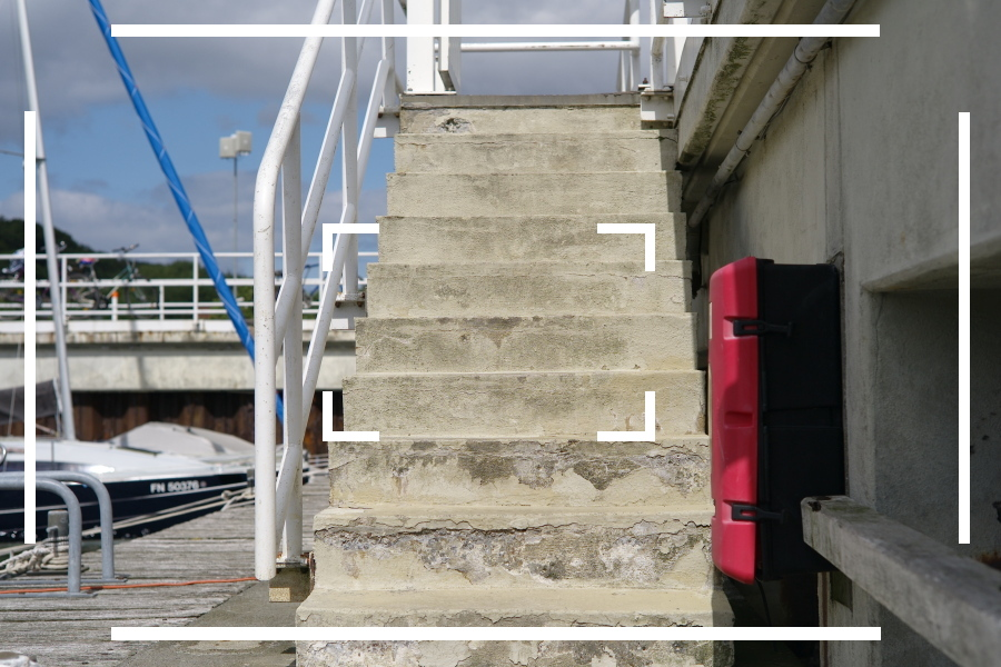 Beispiel der Rahmen für 35mm und 90mm Brennweite